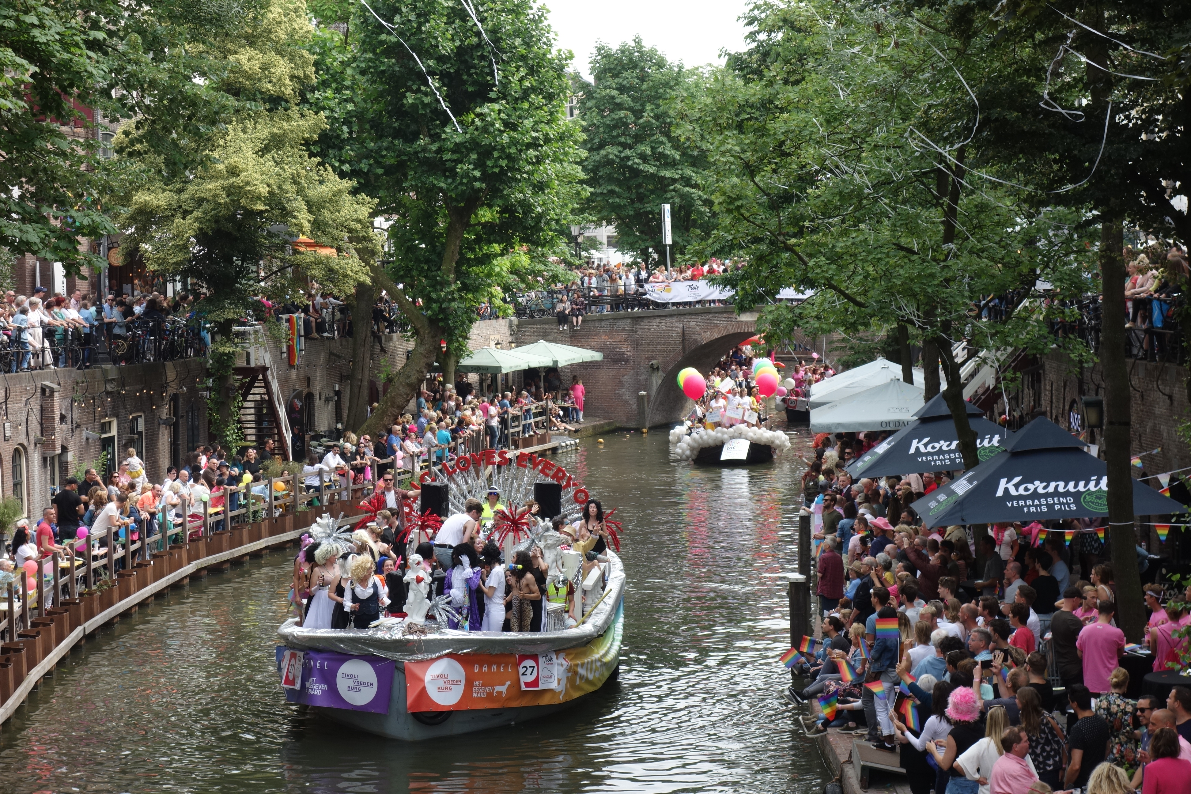 Een aantal boten tijdens de Utrecht Canal Parade van 2018 op de Oude Gracht in Utrecht. De voorste boot is van TivoloVredenburg.